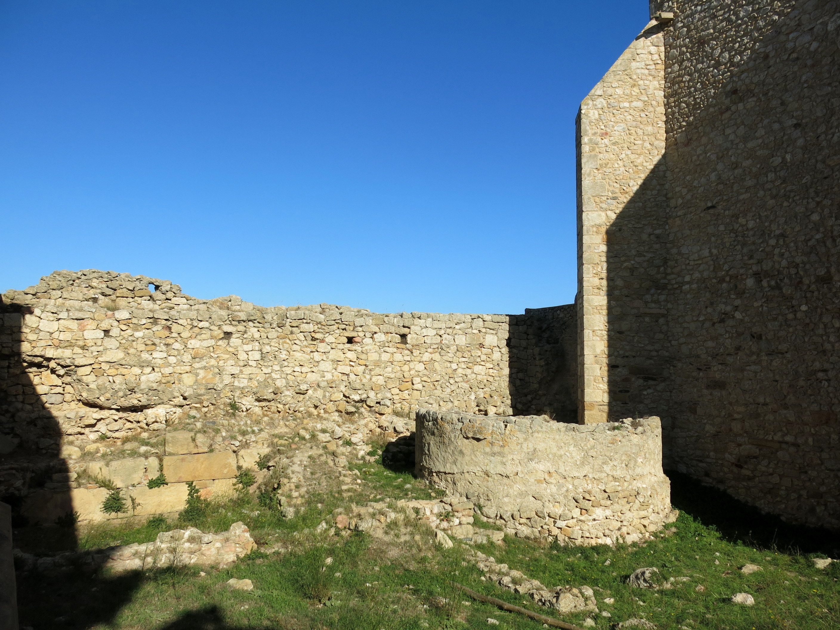 Castell d' Empúries - L' Escala, comarca de l' Alt Empordà - Catalunya